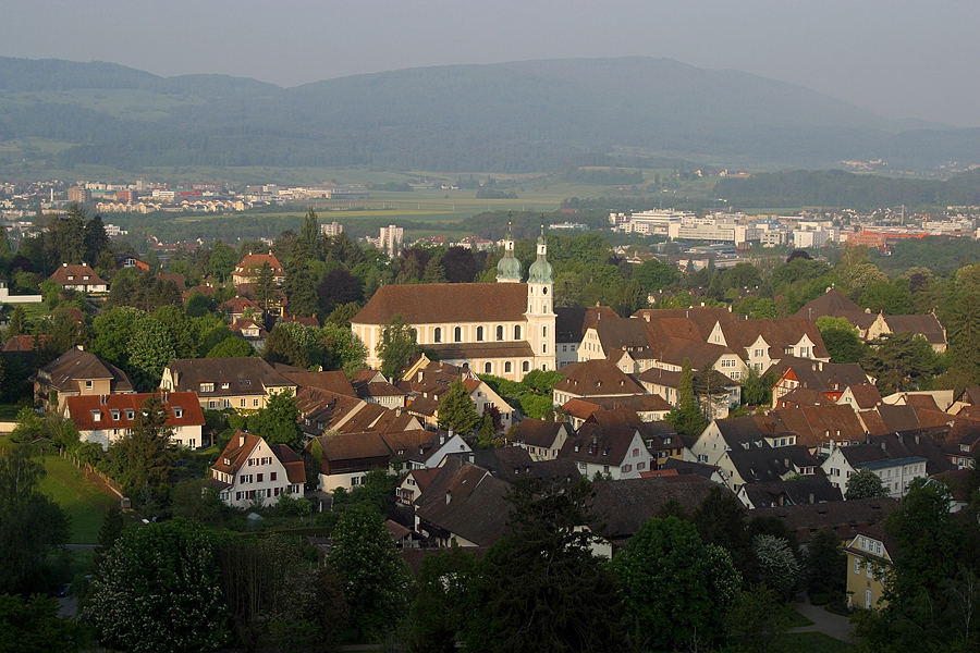 Blick auf den alten Dorfkern mit Dom